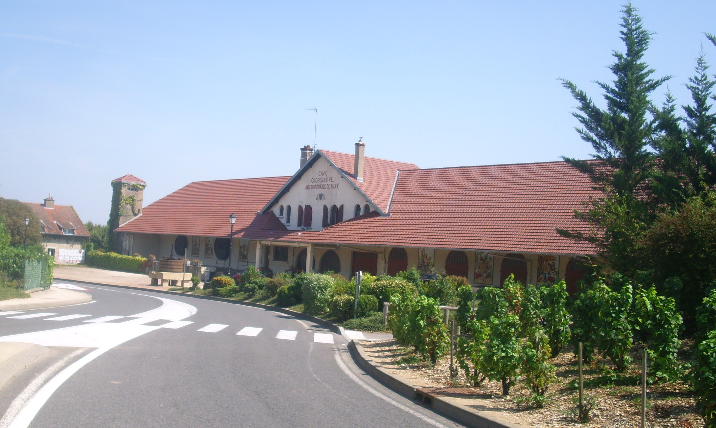 Vue de la cave coopérative de Buxy (71)